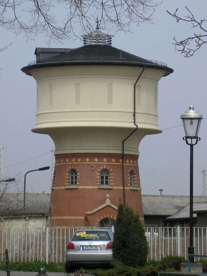 Wasserturm am Hauptbahnhof in Arnstadt (Thüringen).